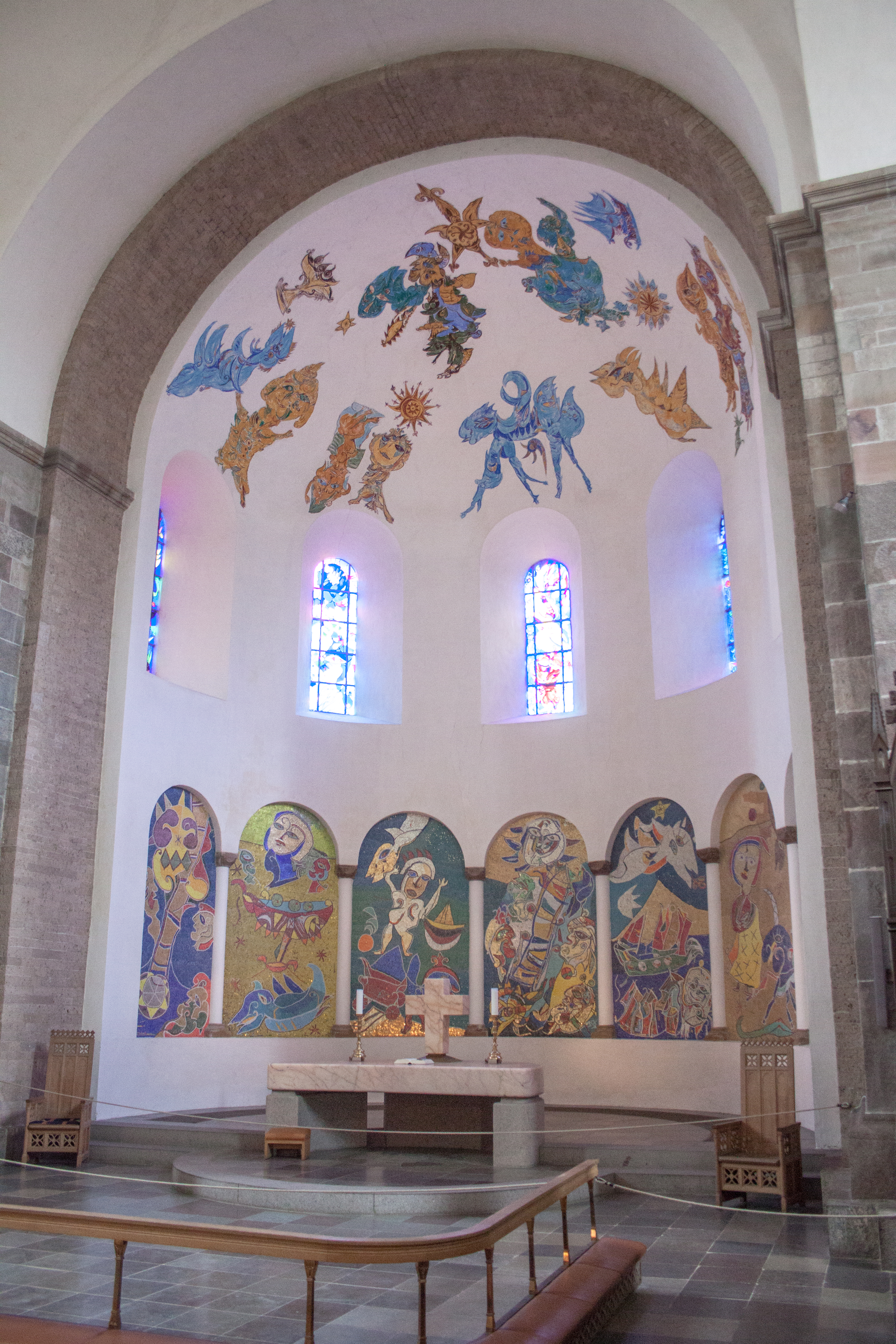 Ribe Domkirke, altar, apse